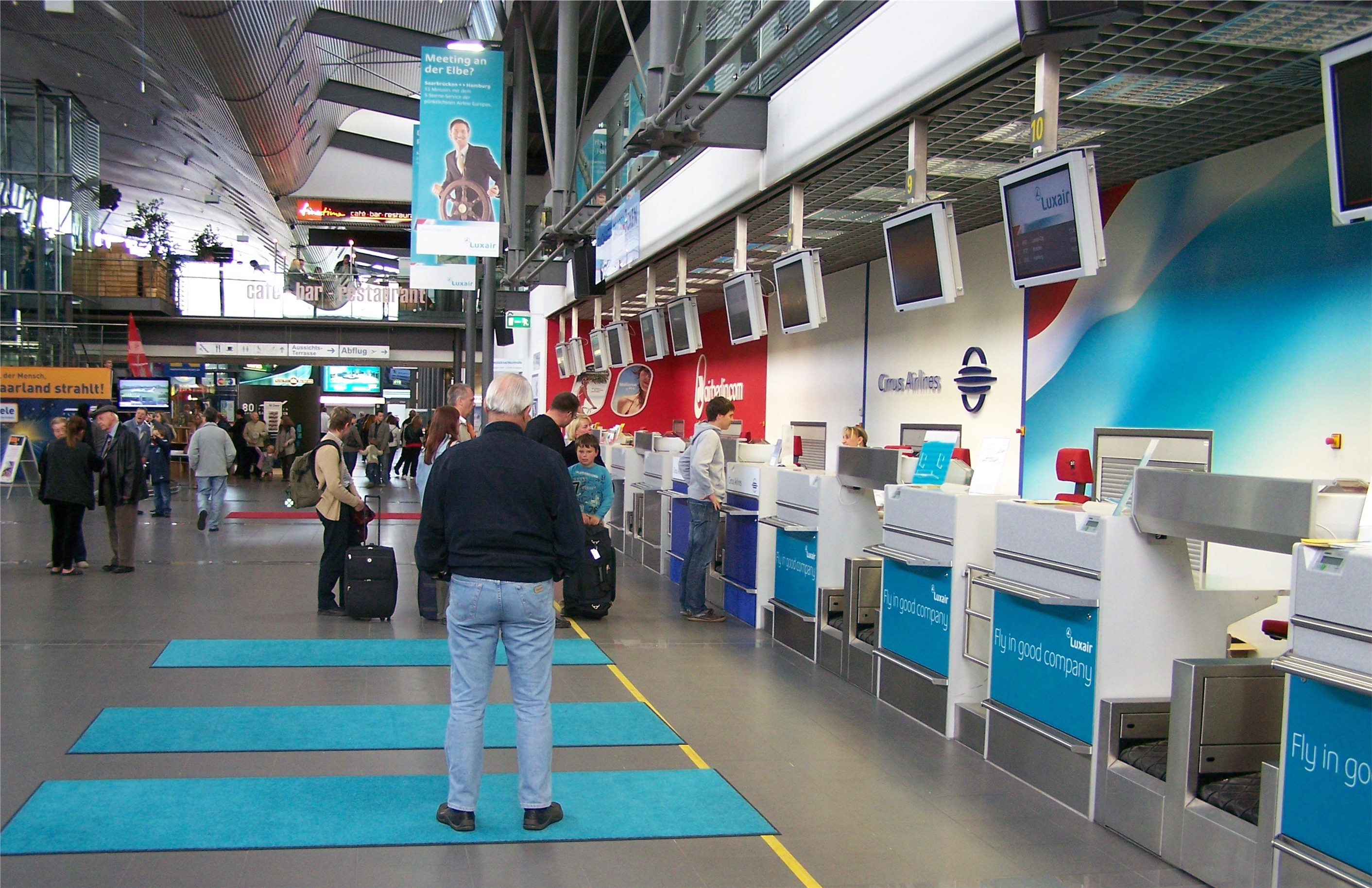 Check-in-Schalter im Terminal des Flughafens Saarbrücken